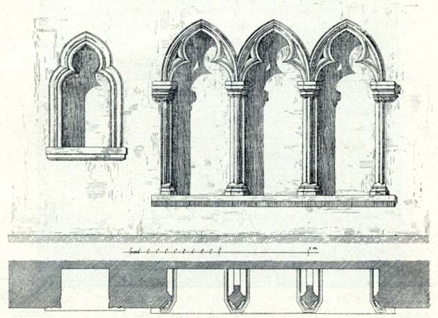 sedilie v kostele svatého Václava a Božího Těla v Křečhoři